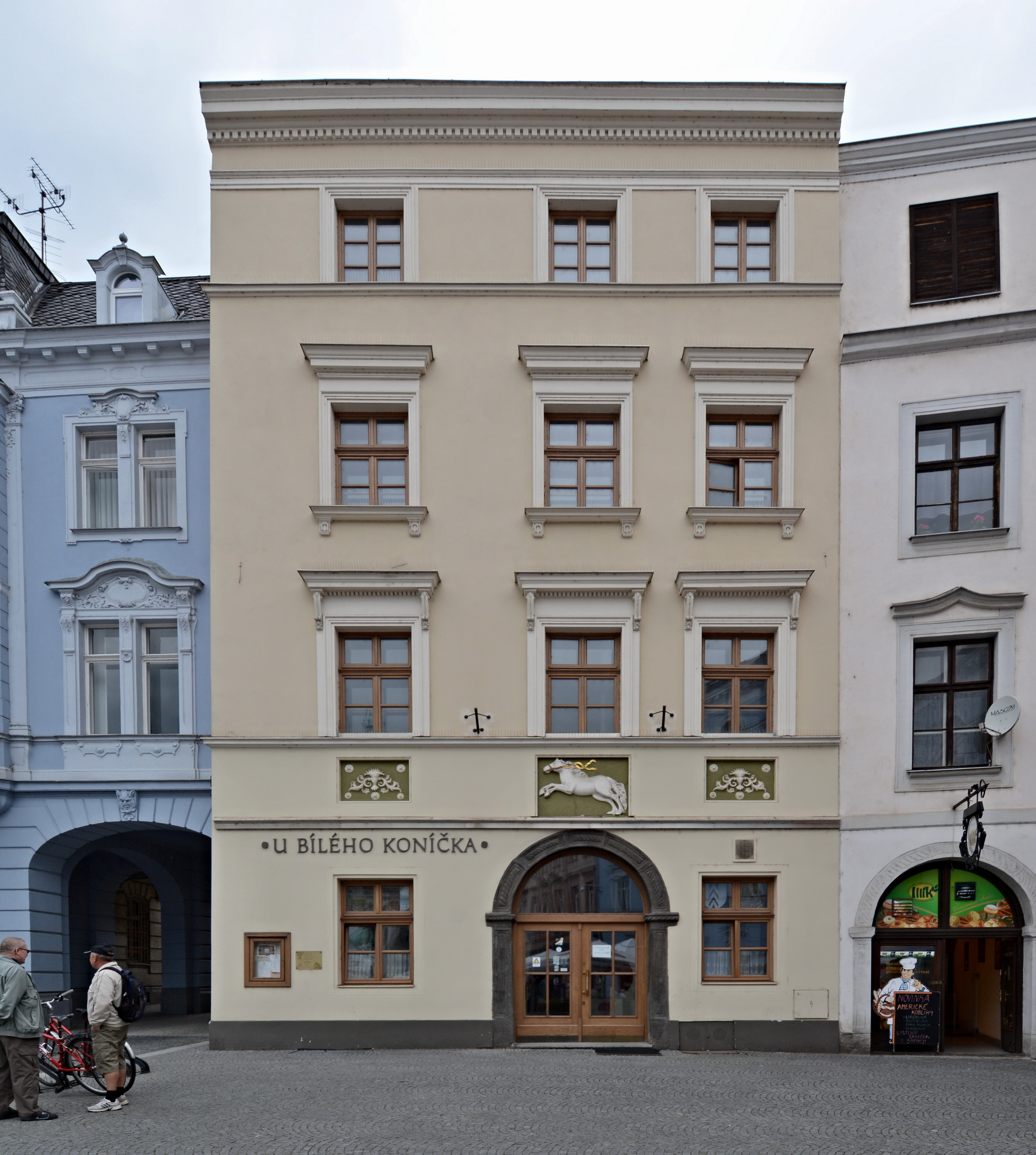 Měšťanský dům U bílého koníčka (Opava), Dolní náměstí 115/4, Opava